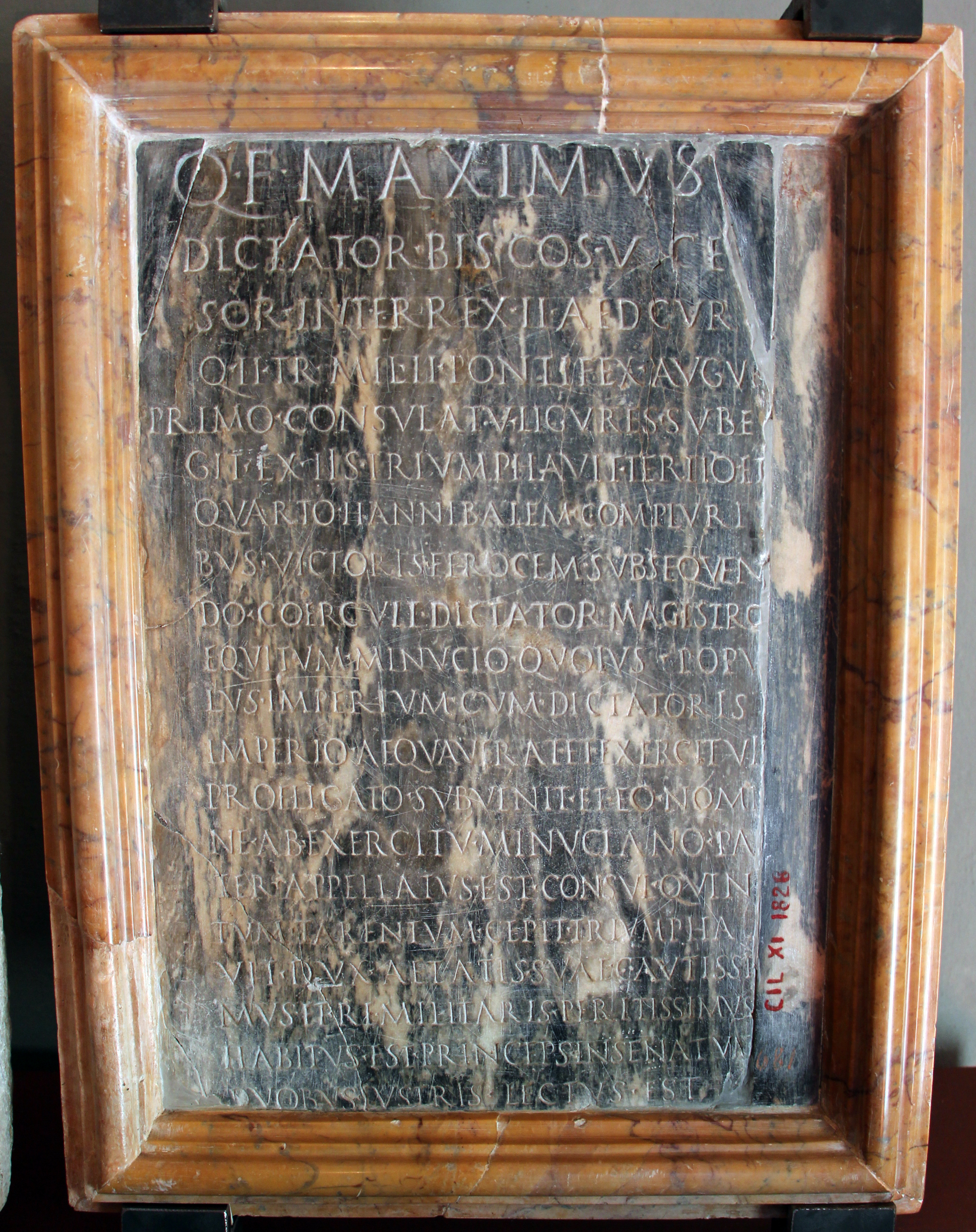 Villa Corsini a Castello - MIBAC. Arezzo. CIL XI 1828 = InscrIt. 13-3, 80 = AE 2003, 267 = AE 2011, 361: [Q(uintus) Fabius] / Q(uinti) f(ilius) Maximus / dictator bis co(n)s(ul) V cen/sor interrex II aed(ilis) cur(ulis) / q(uaestor) b(is) tr(ibunus) mil(itum) II pontifex augur / primo consulatu Ligures sube/git ex iis triumphavit tertio et / quarto Hannibalem compluri/bus victori(i)s ferocem subsequen/do coercuit dictator magistro / equitum Minucio quoius popu/lus imperium cum dictatoris / imperio aequaverat et exercitui / profligato subvenit et eo nomi/ne ab exercitu Minuciano pa/ter appellatus est consul quin/tum Tarentum cepit triumpha/vit dux aetatis suae cautissi/mus et re[i] militaris peritissimus / habitus est princeps in senatum / duobus lustris lectus est This is a photo of a monument which is part of cultural heritage of Italy.